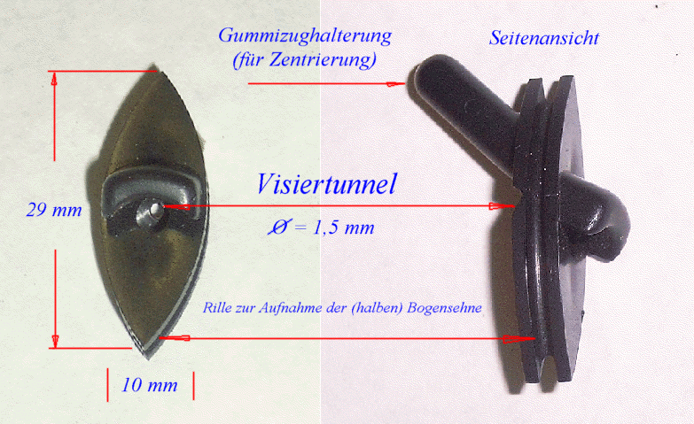 Peepsight